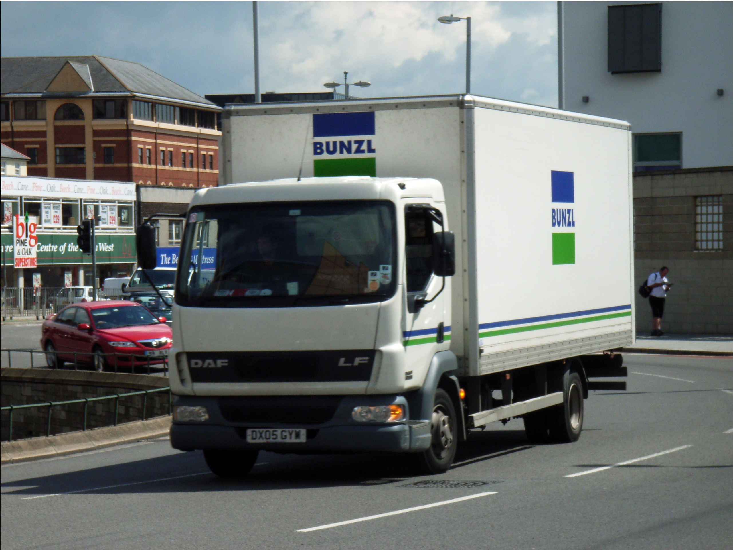 DX05GYW DAFTRUCKS FA LF45.150 BOX VAN 3920cc (31/03/2005) DIESEL Bunzl